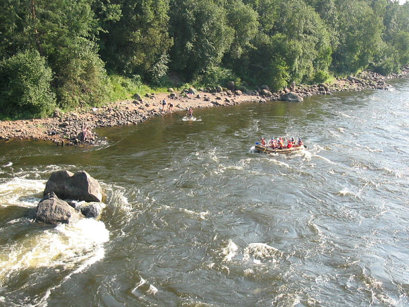 Vuoksa river, Losevo, Russia July-August 2003 река Вуокса, Лосевские пороги from